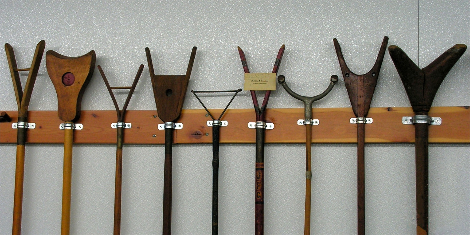 Histirische Shuffleboard Cues